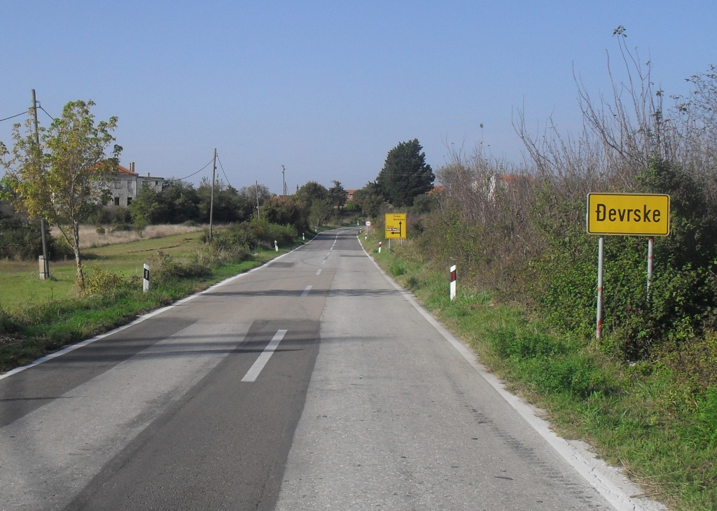 Улаз у Ђеврске из правца Кистања, Далмација